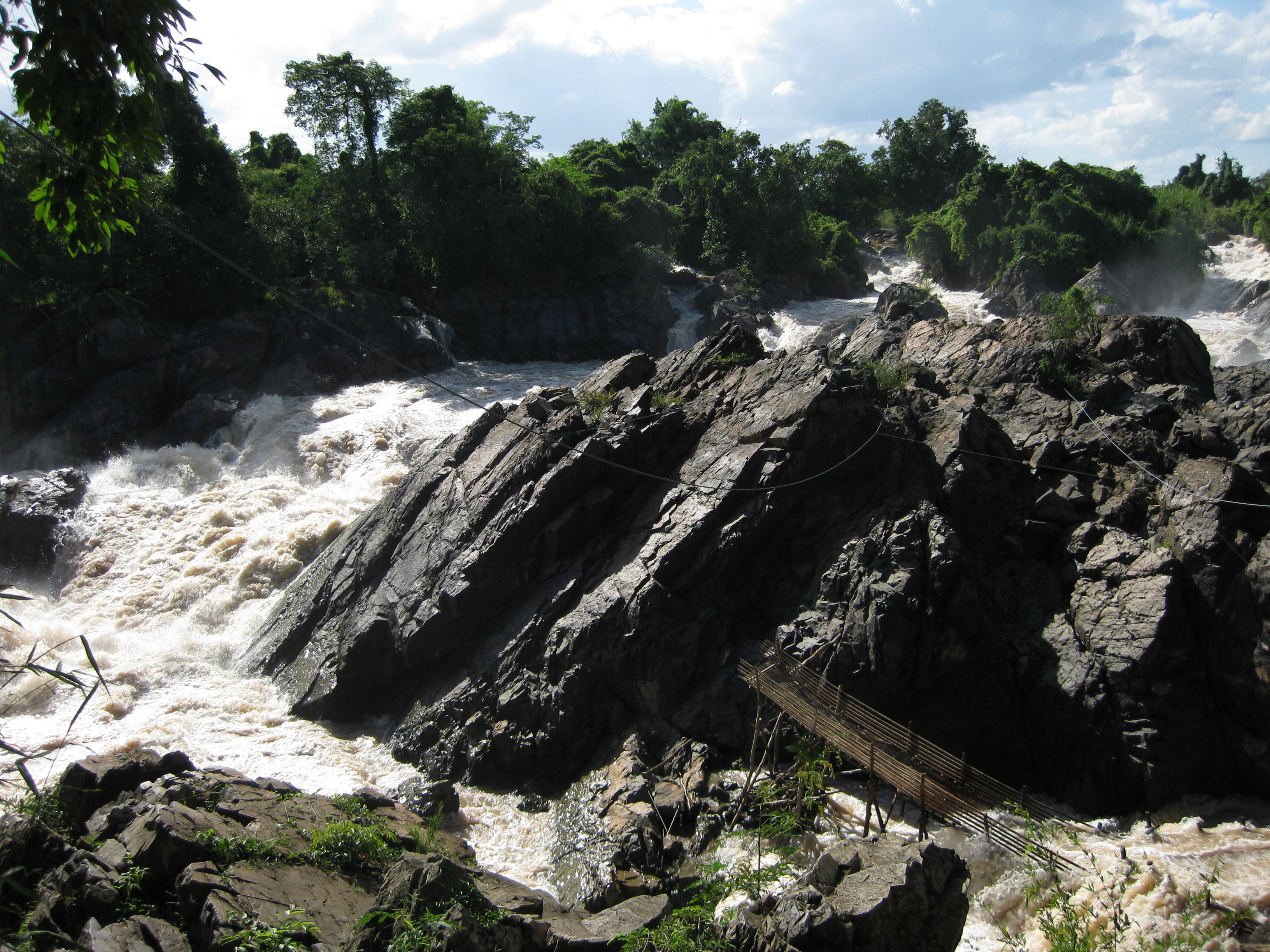 Tad Somphamit rapids, Mekong, Don Khon, Laos